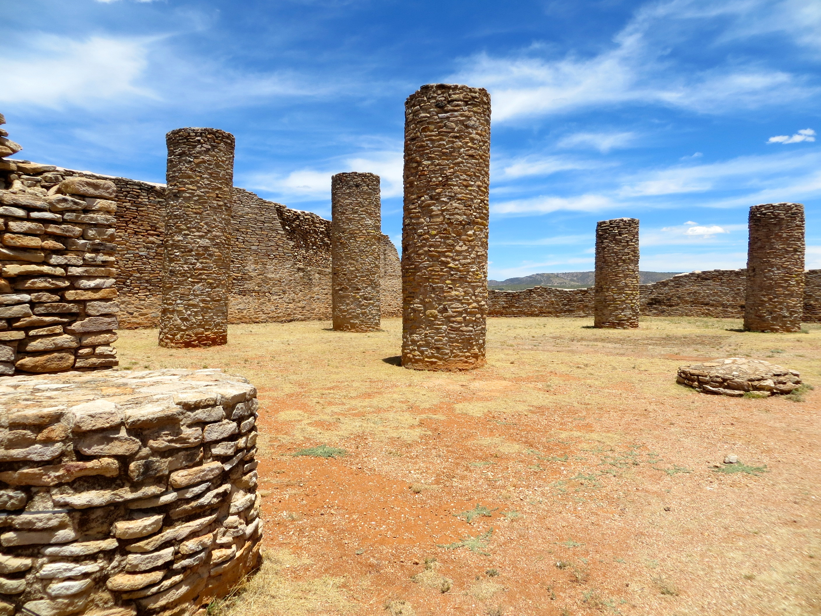 Sala de las columnas